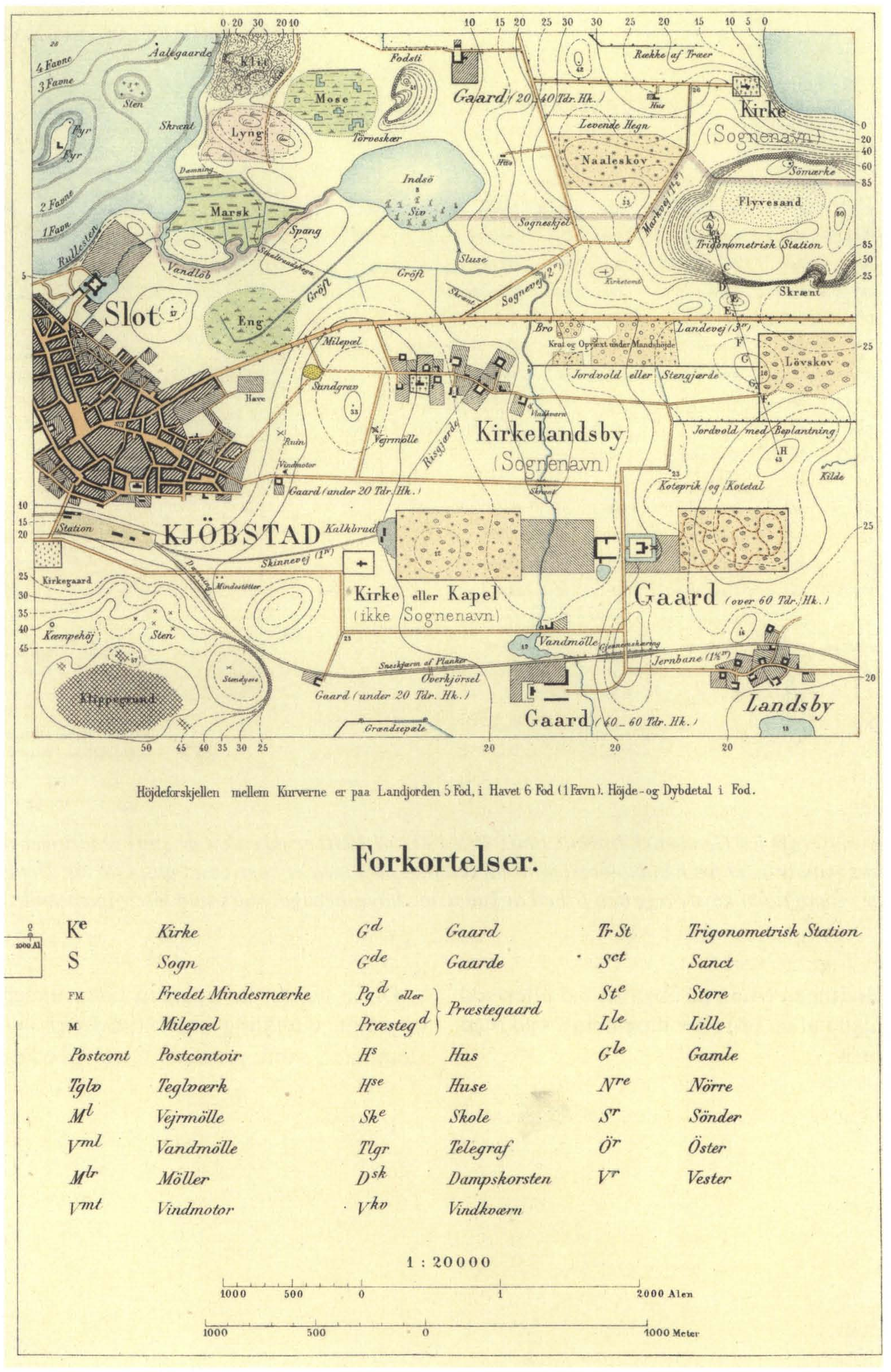 Signaturforklaring til høje målebordsblade (1866-1899)